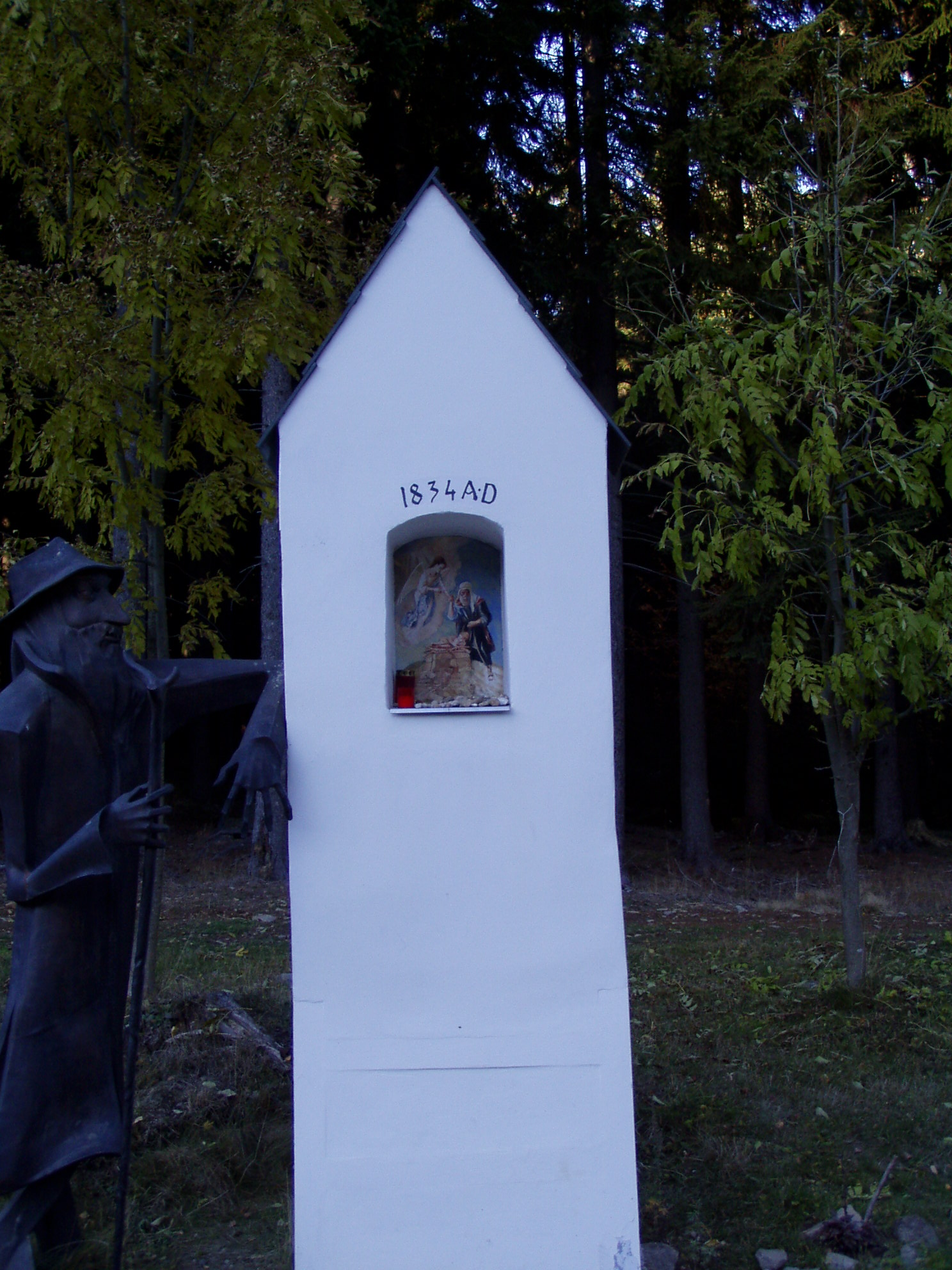 Sloupová kaplička - Chaloupky (Pec pod Sněžkou)